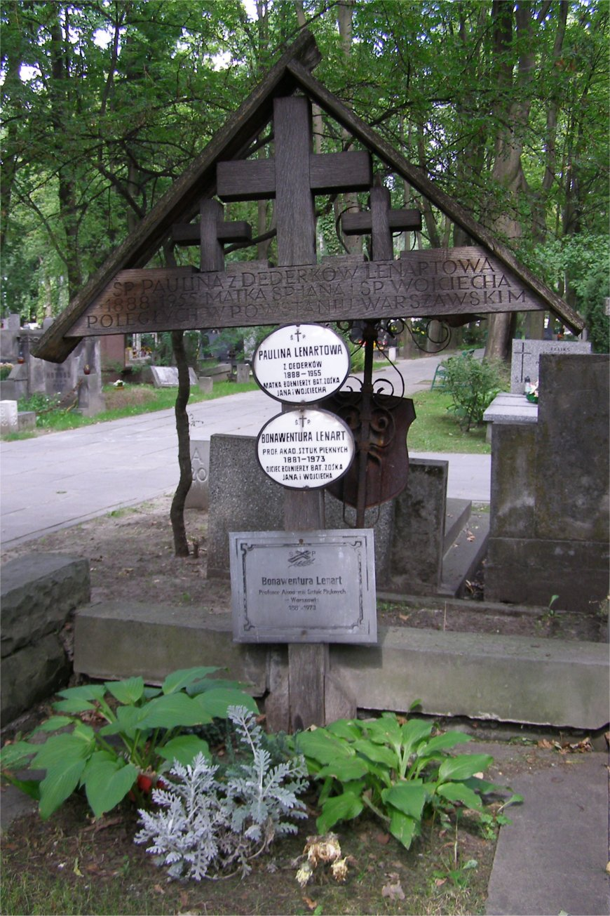 Powązki wojskowe w Warszawie, grób Bonawentury Lenarta (fot Zu)